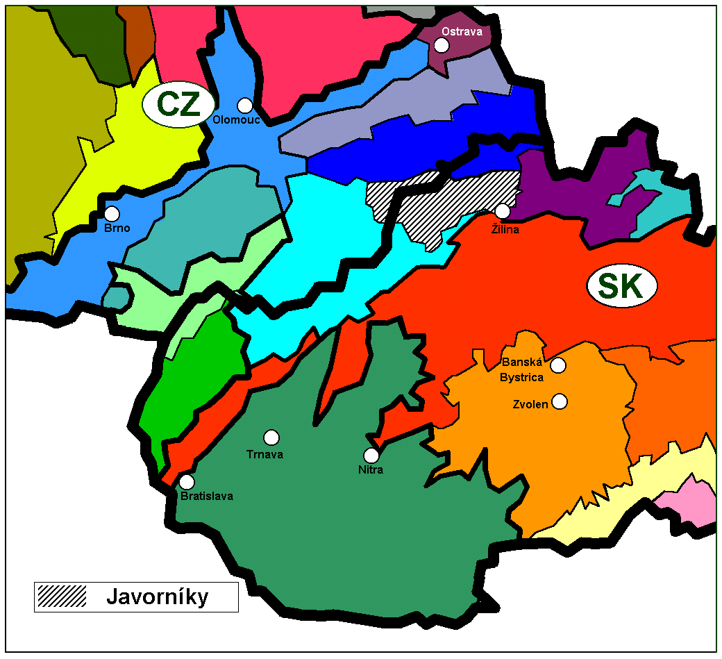 Javorníky